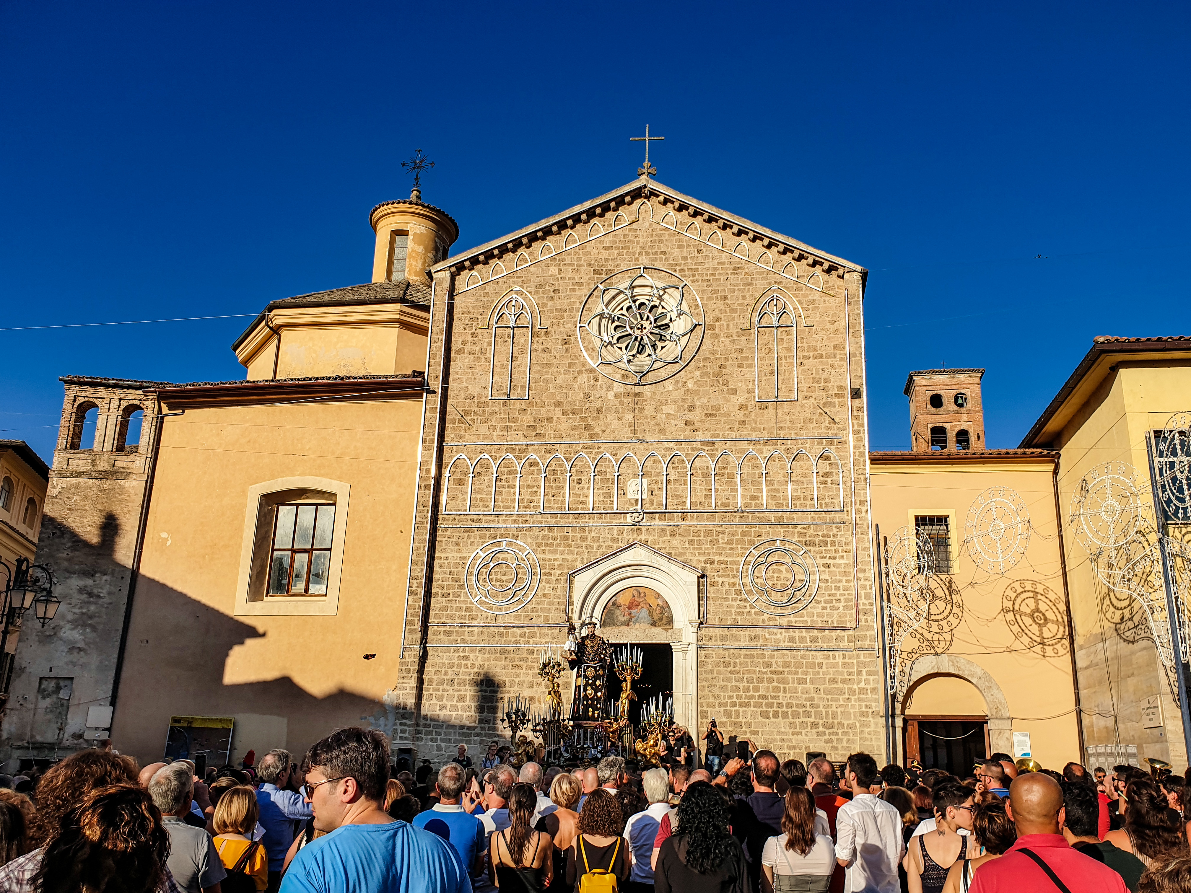 Chiesa di San Francesco, esterno, in occasione della Processione di S. Antonio. Momento dell'uscita della Statua dalla Chiesa e inizio della Processione. ID 12H2820009 This is a photo of a monument which is part of cultural heritage of Italy. Questa è una foto di un bene culturale italiano che partecipa al concorso Wiki Loves Valle del Primo Presepe 2019, gestito in coperazione con Wikimedia Italia. This is a photo of a monument which is part of cultural heritage of Italy. This monument participates in the contest Wiki Loves Valle del Primo Presepe 2019, operated in cooperation with Wikimedia Italia.